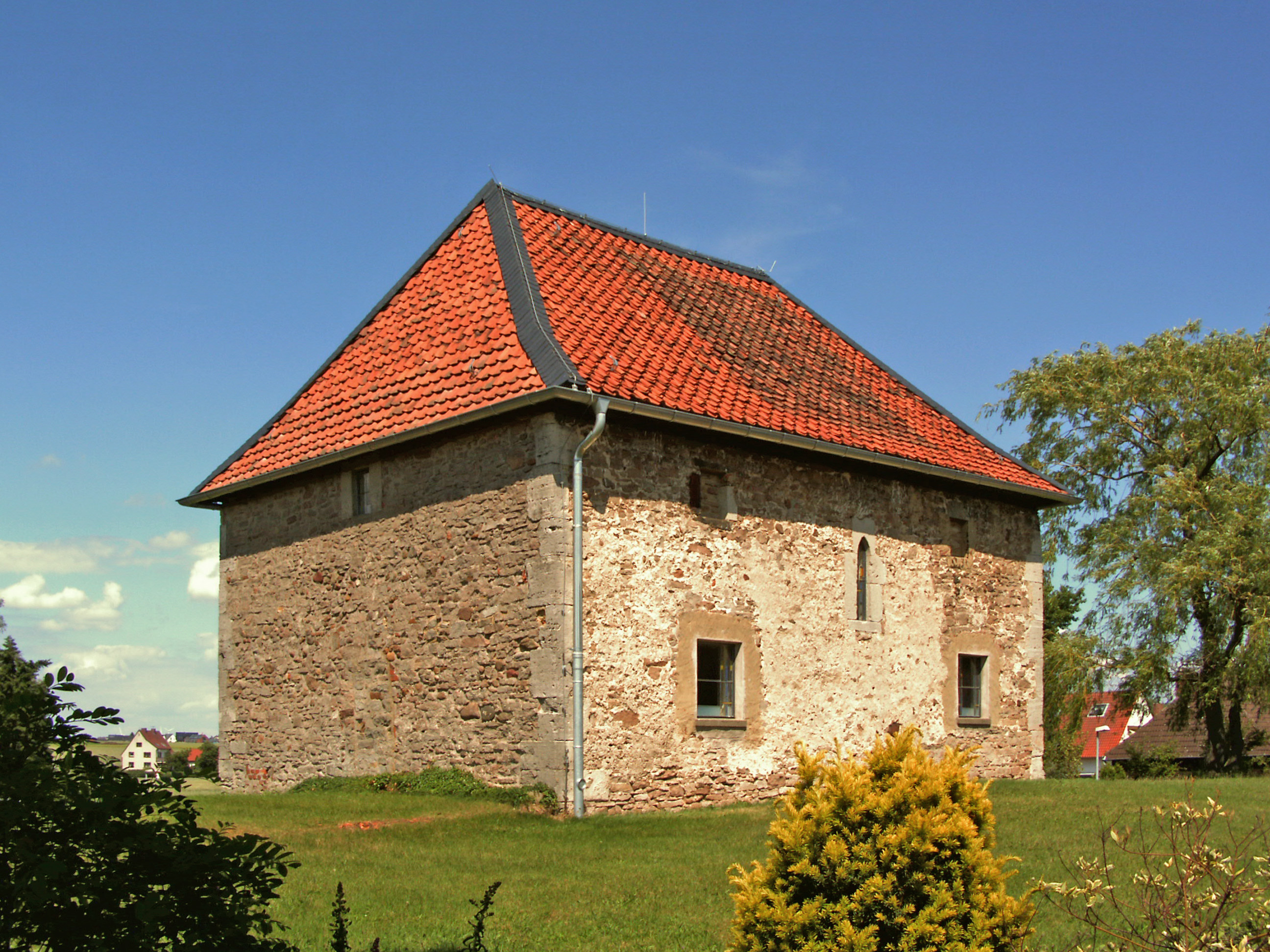 Evangelisch-lutherische Kapelle in Klein Steimke, Ortsteil von Königslutter